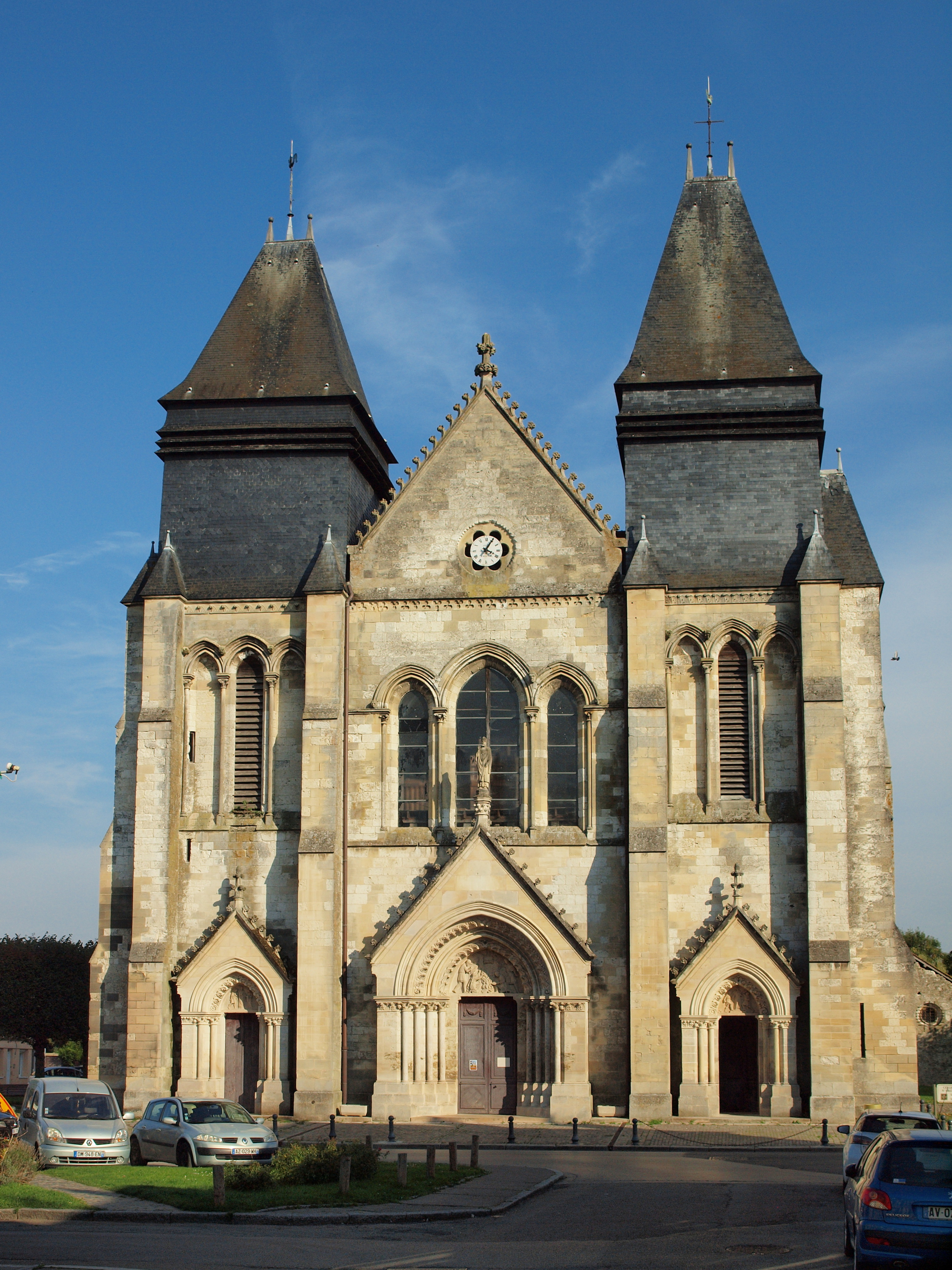 Collégiale Saint-Hildevert de Gournay-en-Bray (Seine-Inférieure, France)